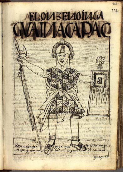 Illustration from the book El primer nueva corónica y buen gobierno